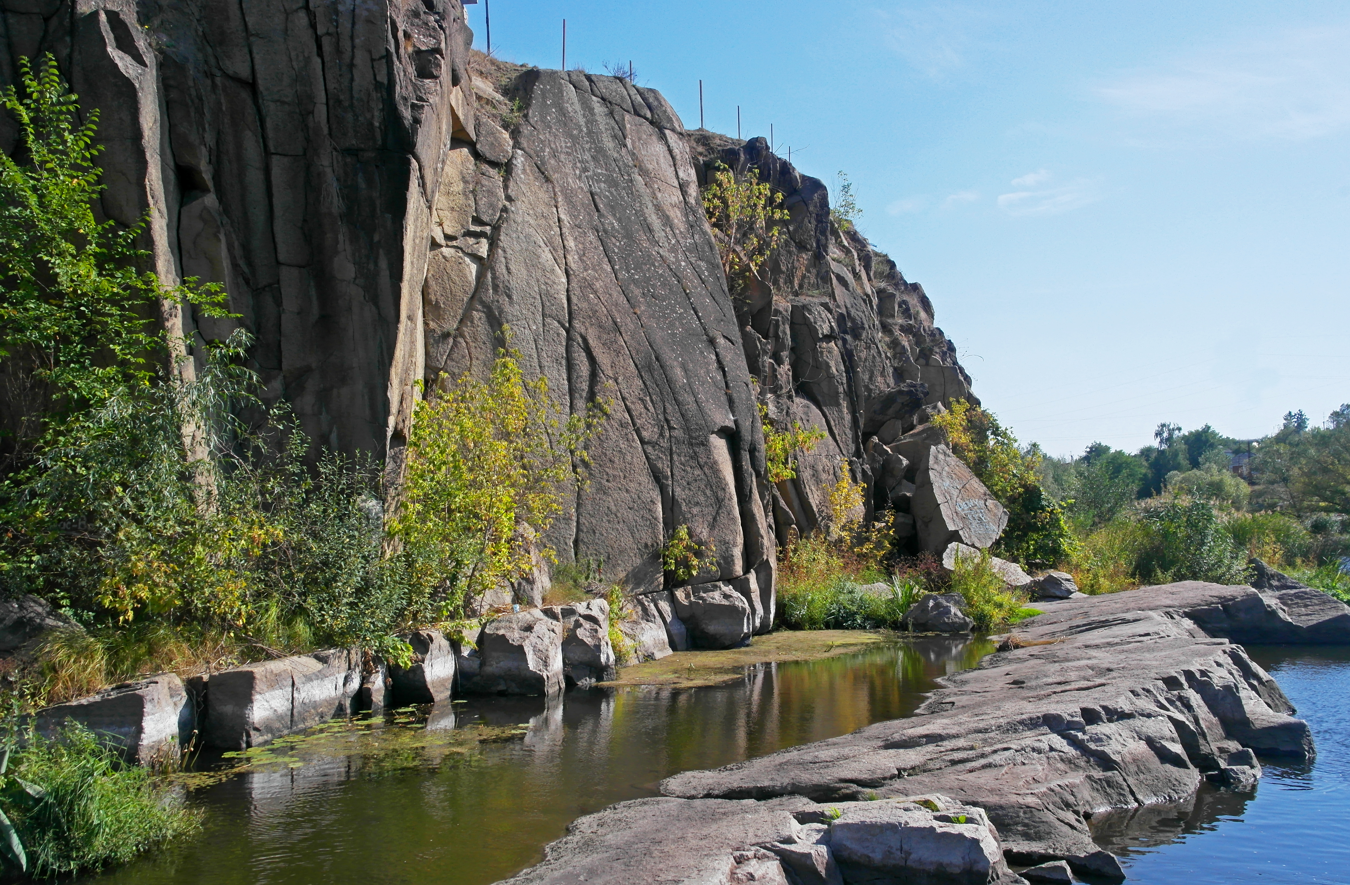 Відслонення богуславських гранітів, Богуславський район, Богуславська міська рада